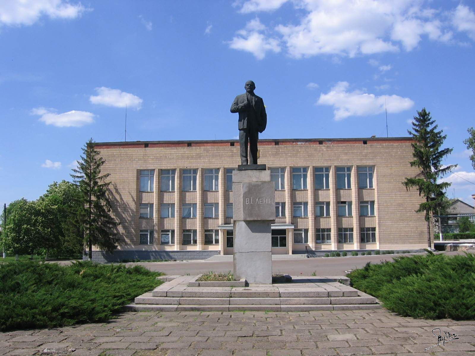 Пам'ятник В. І. Леніну